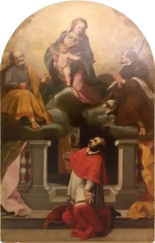 Vergine e il Bambino con san Giuseppe e il beato Amato in gloria venerati da san Carlo Borromeo, Girolamo Cialdieri (1621) This is a photo of a monument which is part of cultural heritage of Italy.